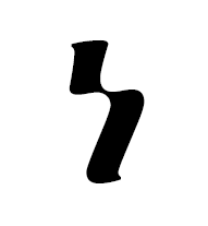 нахас амхар